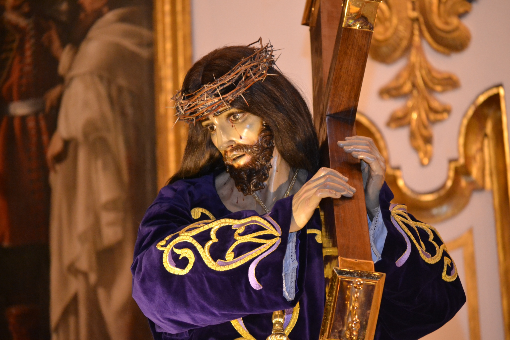 Foto tomada antes del traslado del año 2013